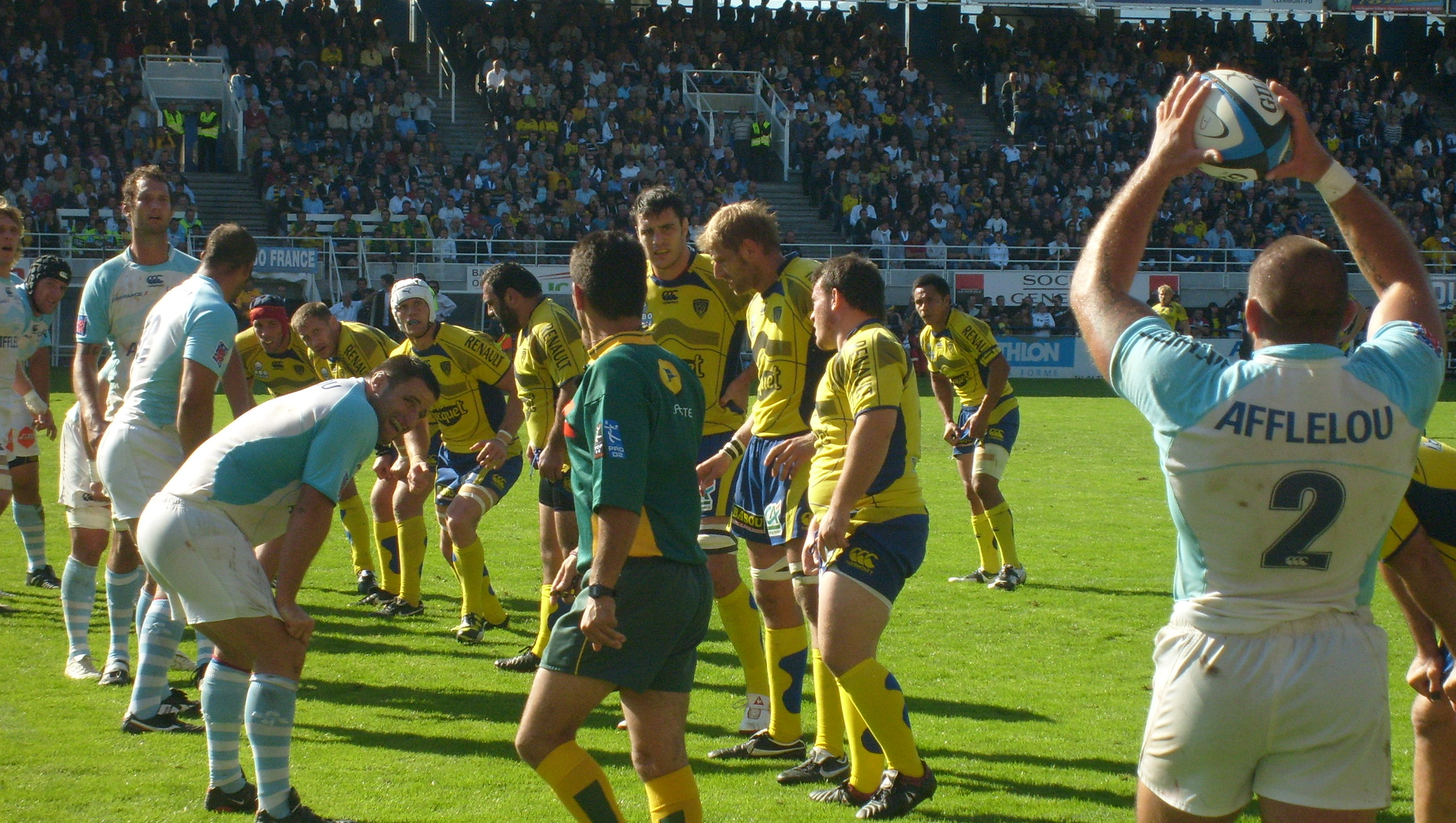 Les avants de l'ASM Clermont Auvergne s'alignent en touche face à l'Aviron Bayonnais au Stade Marcel Michelin de Clermont-Ferrand. Les avants clermontois de gauche à droite : Alexandre Audebert, Elvis Vermeulen, Julien Bonnaire, Davit Zirakashvili, Loïc Jacquet, Thibaut Privat et Thomas Domingo. Le demi de mêlée Kevin Senio au centre en arrière plan